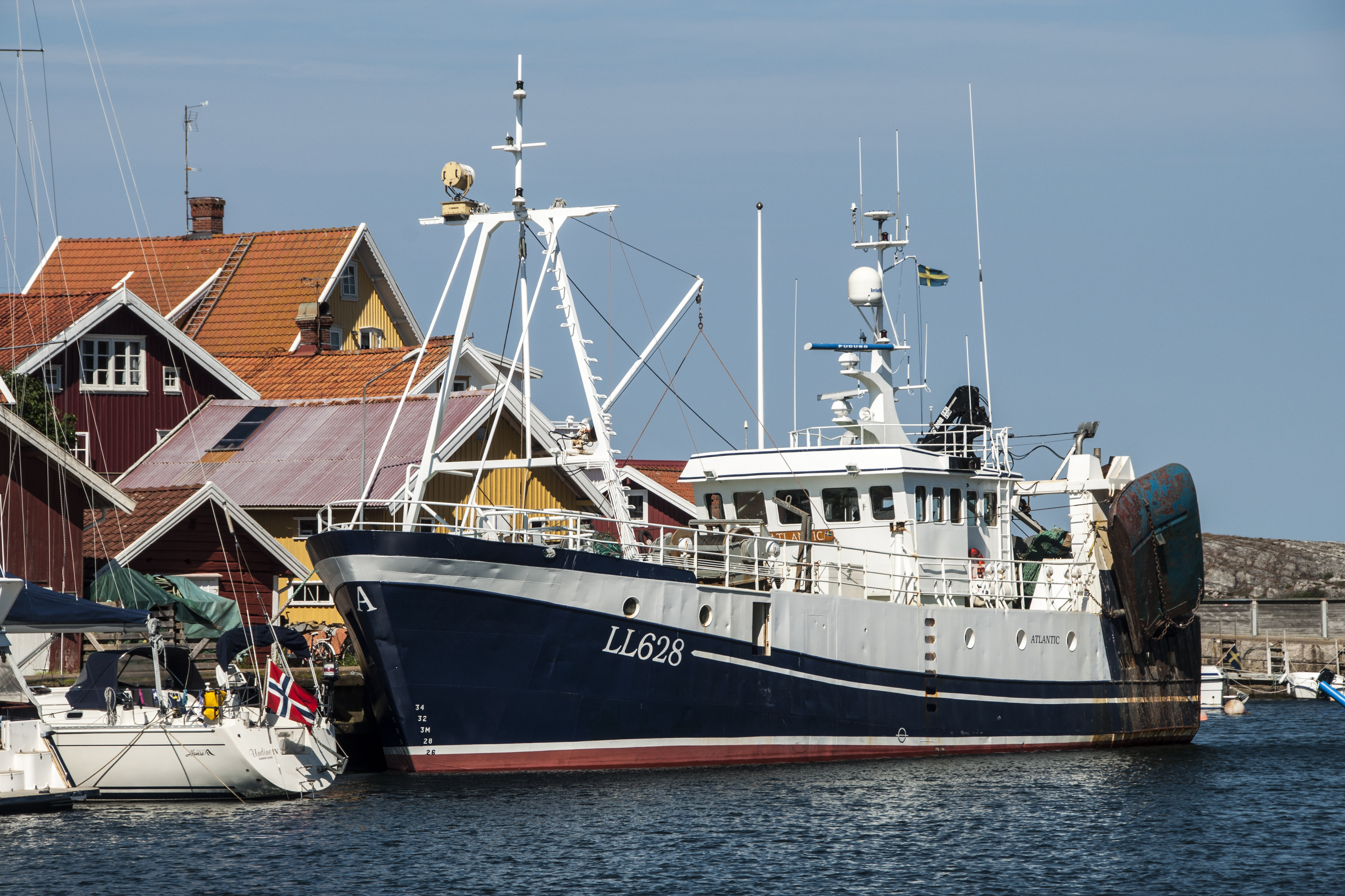 Atlantic V i Grundsunds hamn. Byggd 1988 vid Smögens plåt & svetsindustri, Smögen som Venus av Nogersund. Såldes i april 2005 till Grundsund och fick namnet Atlantic LL 628